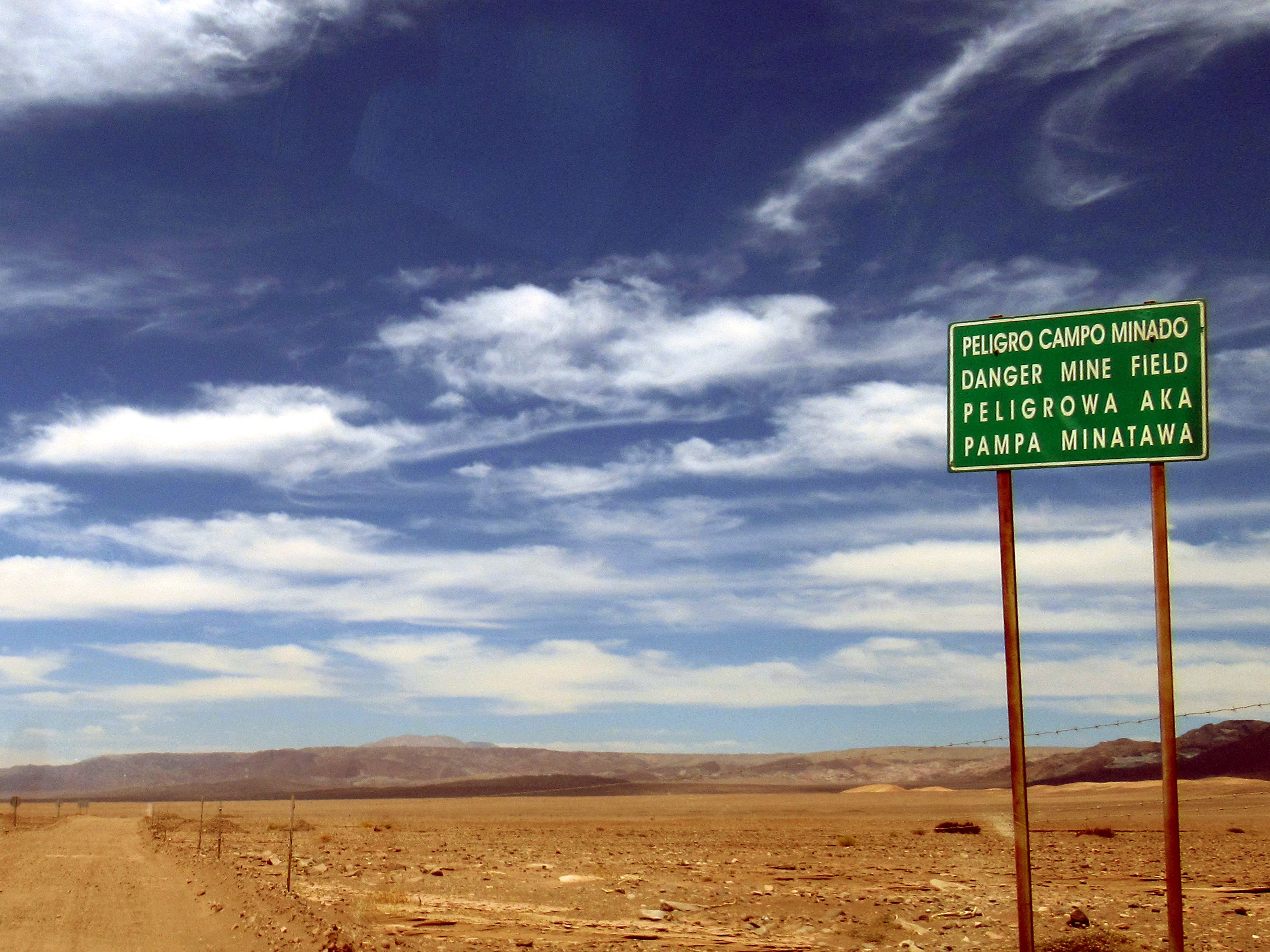 Ruta B-241, Km 3,400, 2421 m s.n.m.: Llano de la Paciencia, San Pedro de Atacama. Aqui la ruta cruza un campo minado.